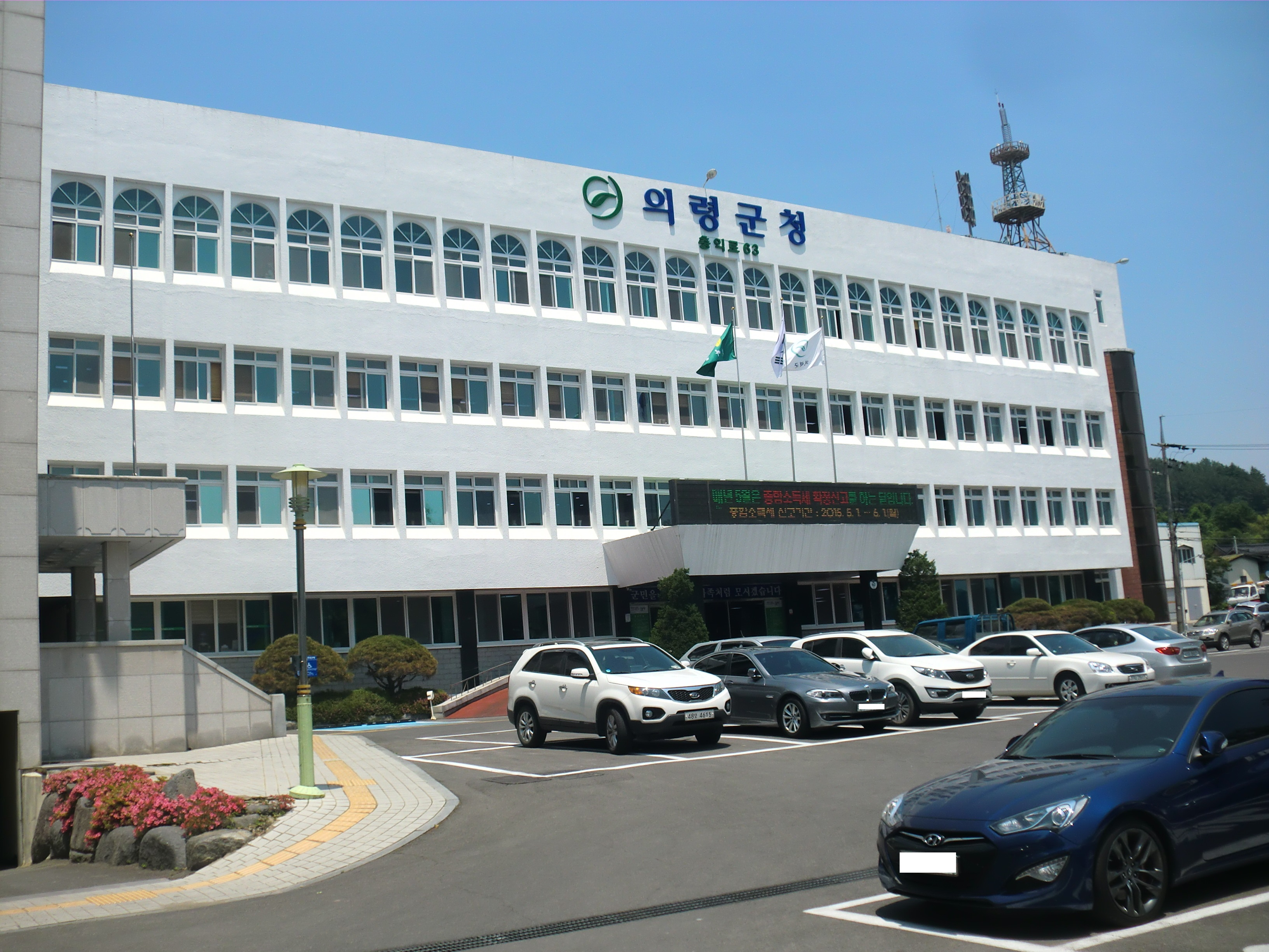 경상남도 의령군에 있는 의령군청